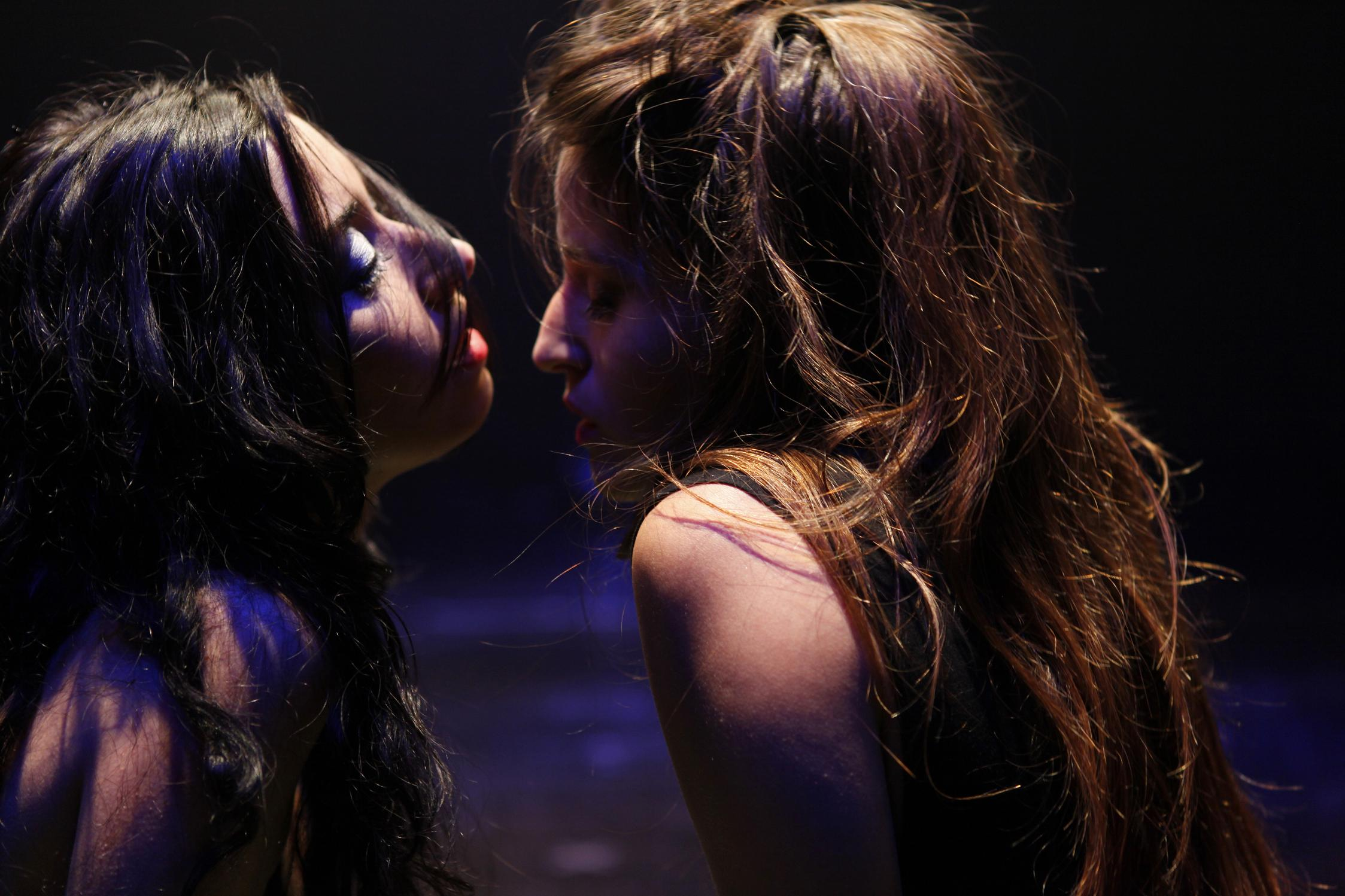 הילה סעדה ברומאו ויוליה האנגר גשר עם ליאל דניר